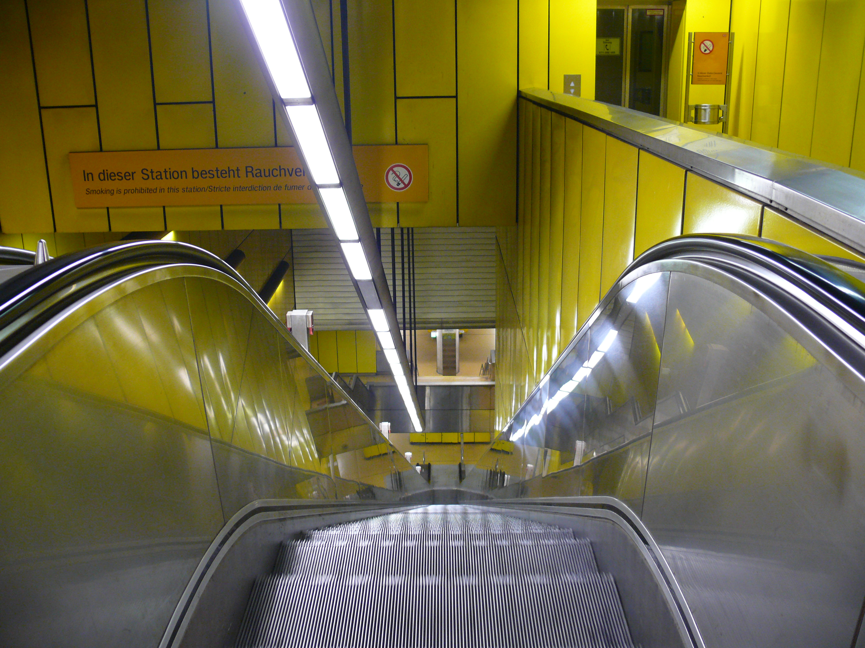 Rolltreppe von der westlichen Verteilerebene, hinunter zur Bahnsteigebene am unterirdischen S-Bahnhof Schwabstraße in Stuttgart. Rechts oben der Fahrstuhl.